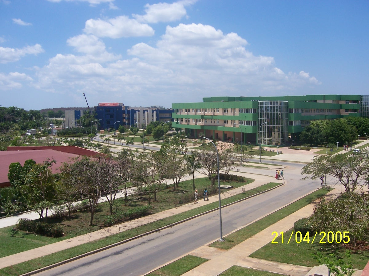 Vista del area docente de la UCI